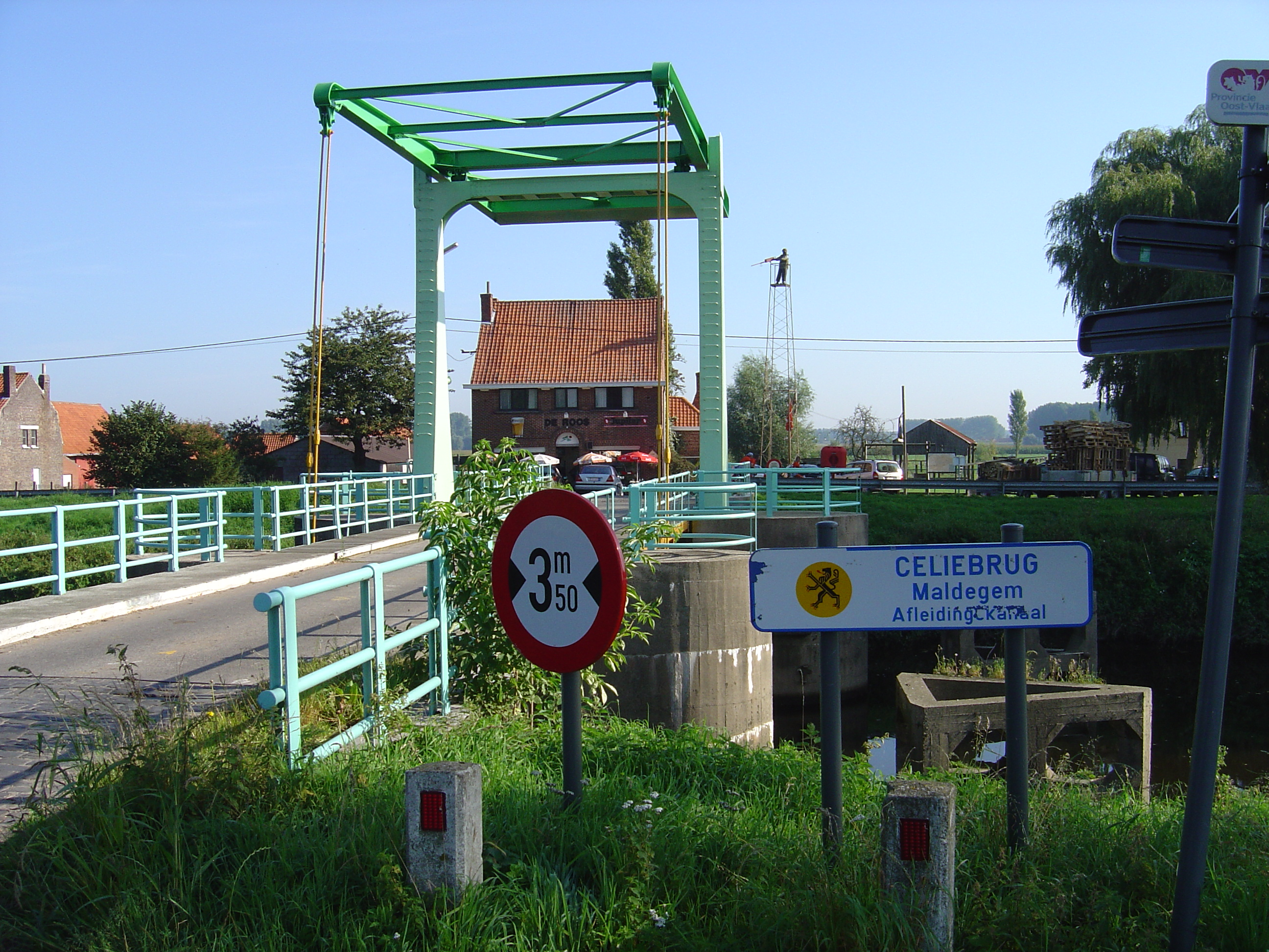 De Celiebrug over het afleidingskanaal in Maldegem.